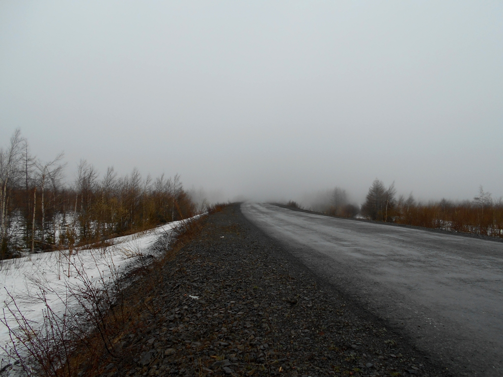 Автодорога Р454, участок Лидога - Ванино. Съёмка 17 мая 2015 г., верховья р. Хича.